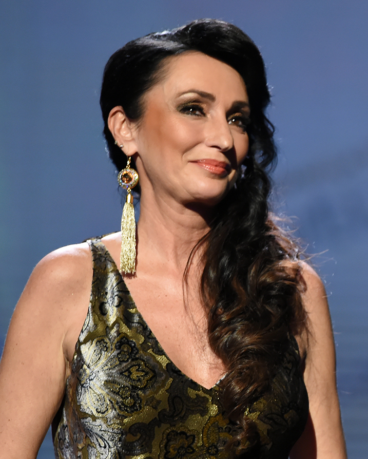 Sisa Sklovská, 2016